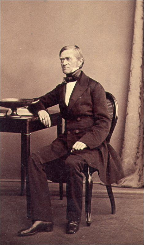 Der deutsche Archäologe Eduard Gerhard (1795-1867)